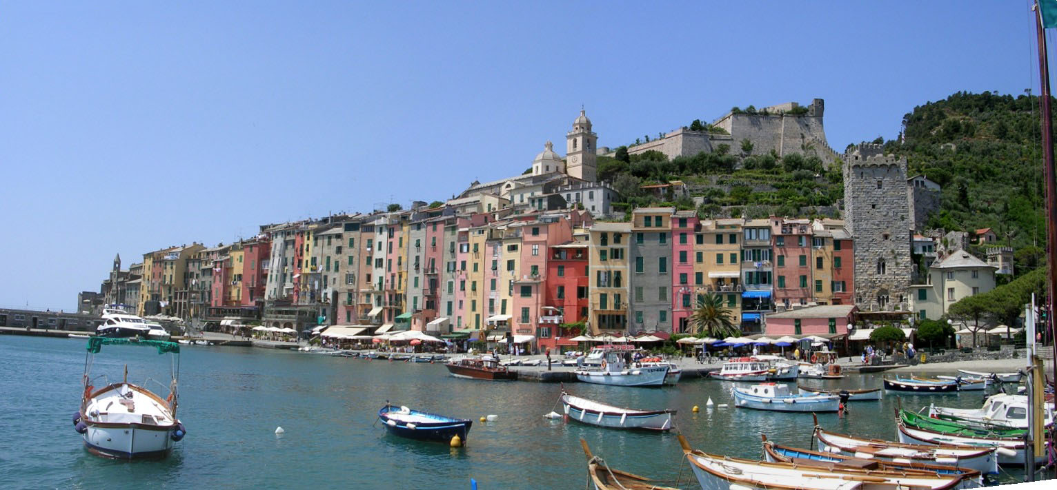 Vista panoramica di Portovenere